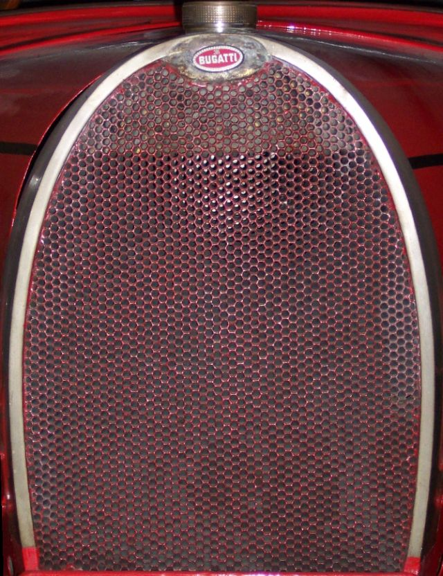 Bugatti Typ 40 Kühler im Motortechnica Bad Oeynhausen.